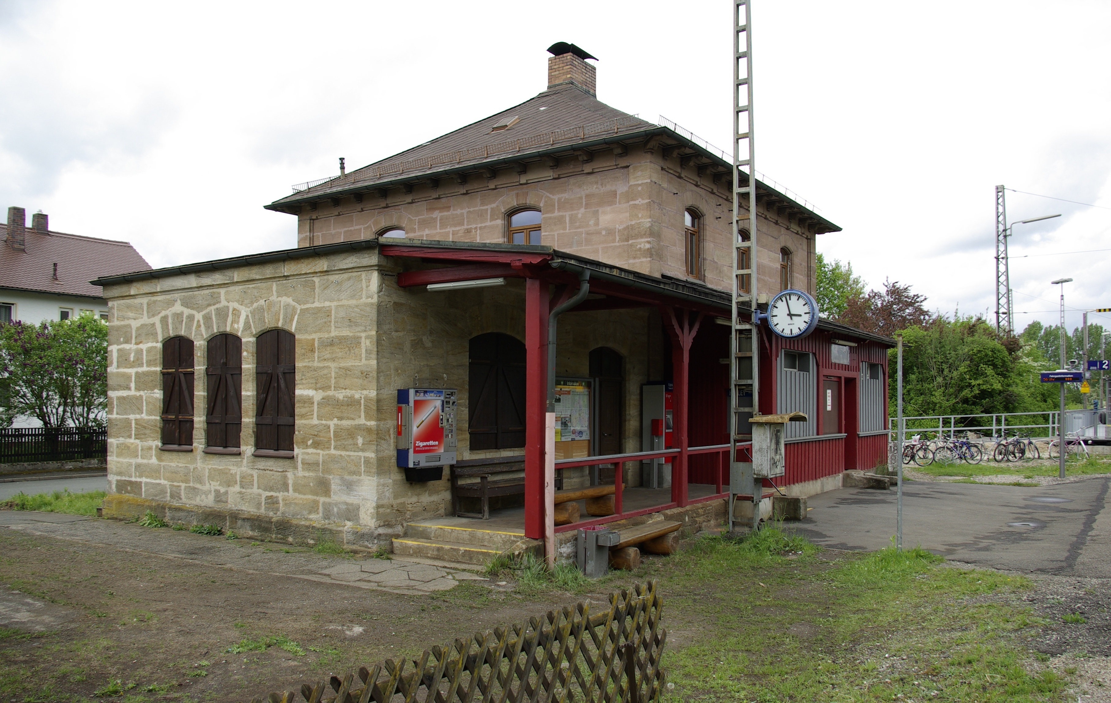 Bahnhof Eltersdorf bei Erlangen